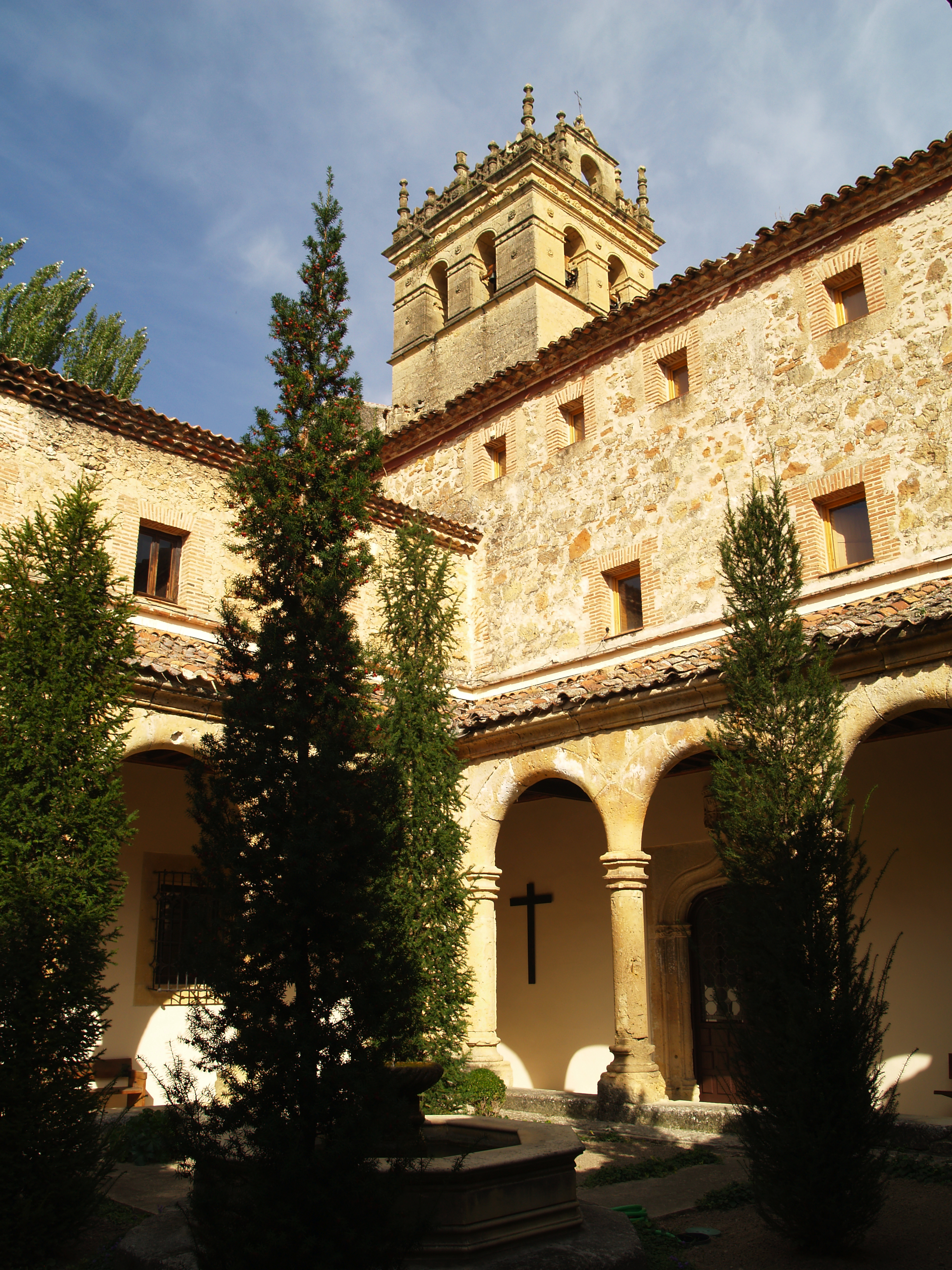 Monasterio del Parral (Segovia). Claustro pequeño y torre de la iglesia. Santa Maria del Parral LocationSegovia, SpainCoordinates40° 57′ 21.7″ N, 4° 07′ 35.7″ W Established1447Authority control : Q1997245 VIAF: 236123145 BIC: RI-51-0000129 GND: 4645668-5 BNE: XX104503 JCyL: 11914 institution QS:P195,Q1997245